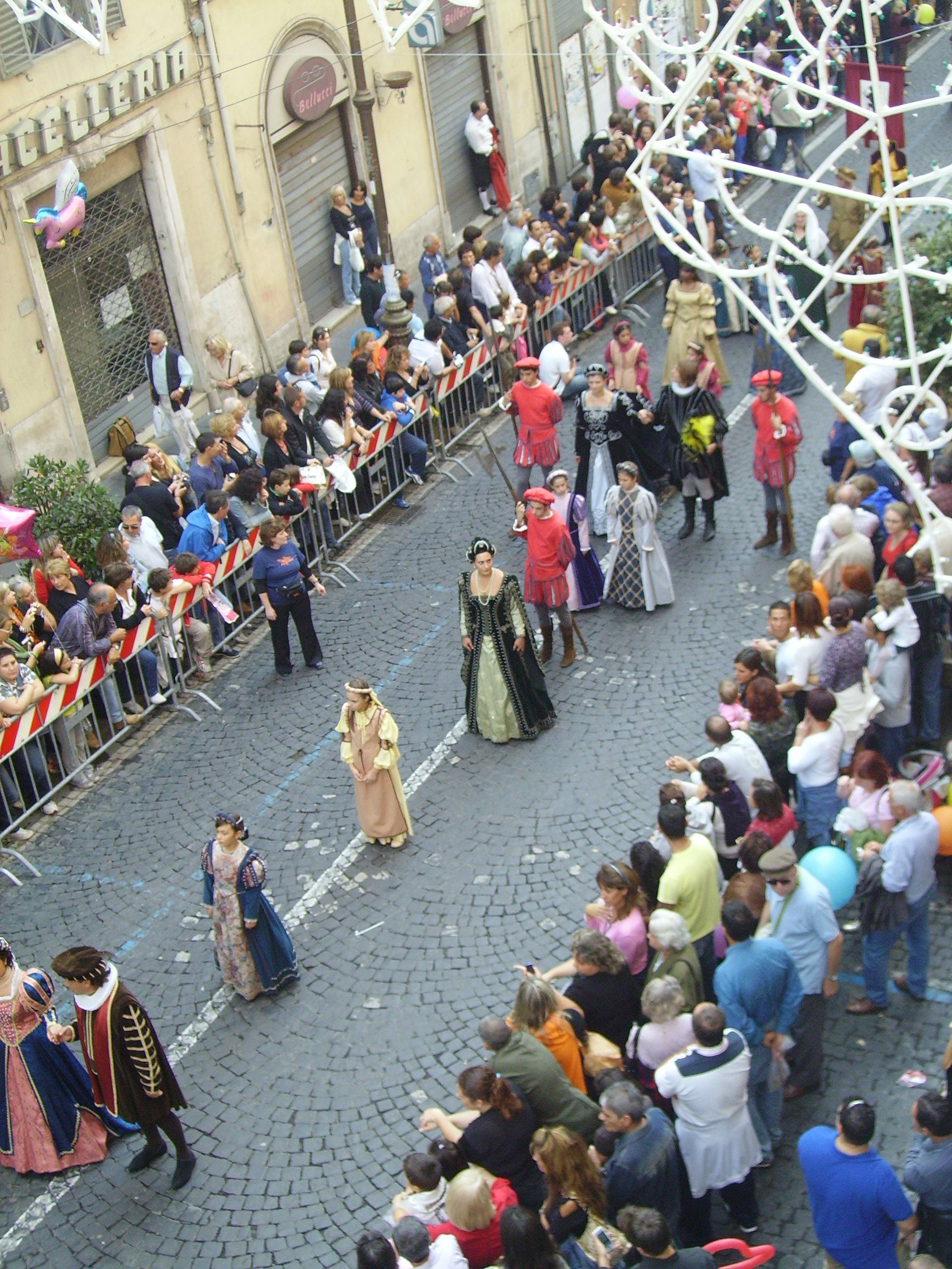 Corteo Storico Sagra 2007 Marino